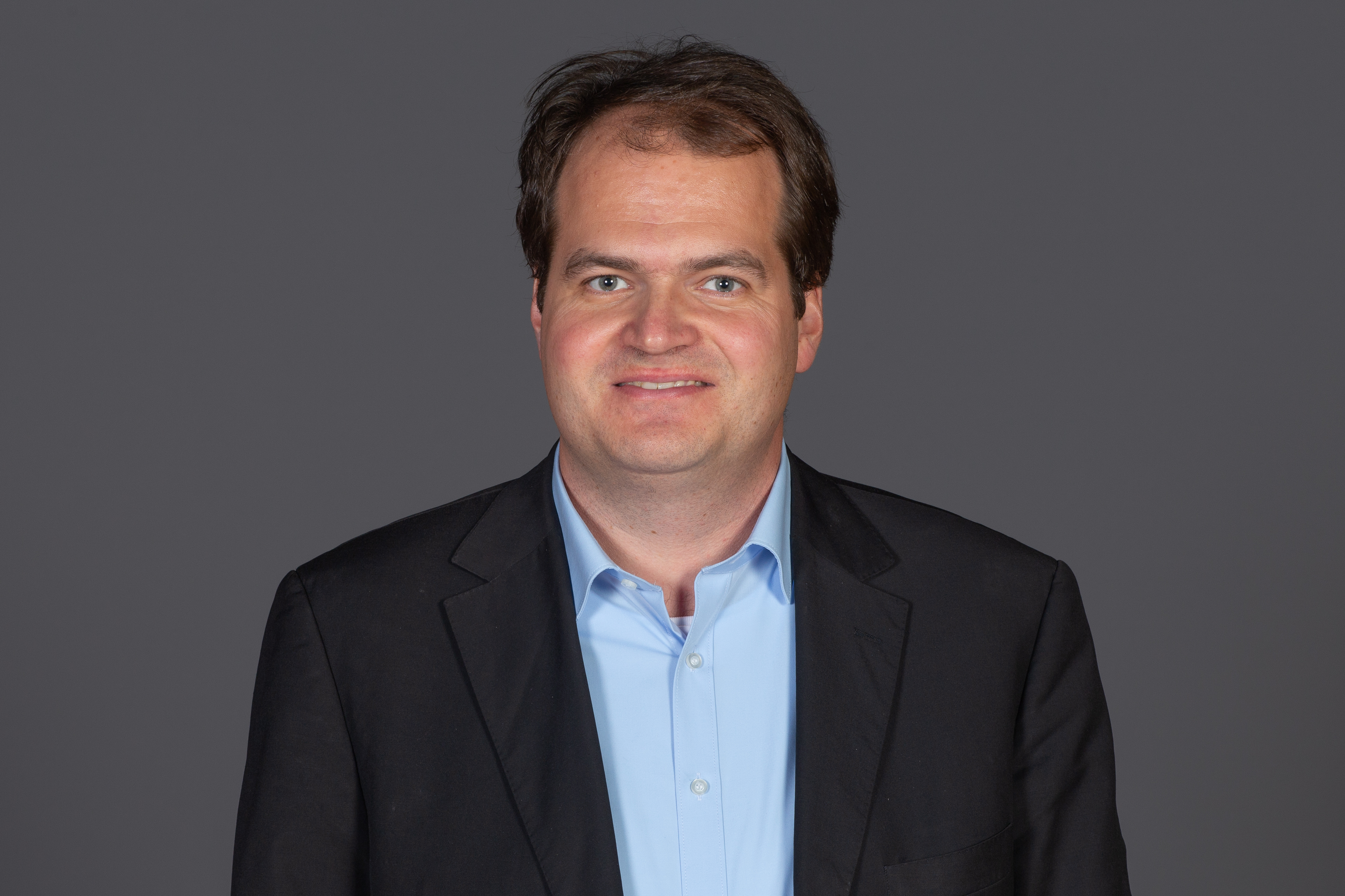 Abgeordnete(r) der Bürgerschaft der Freien und Hansestadt Hamburg Tim Stoberock